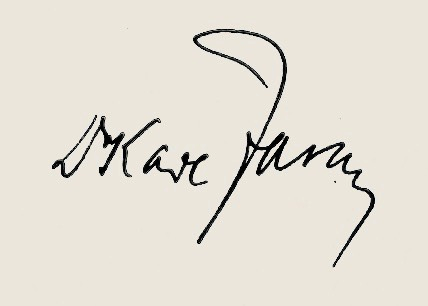 Autograph von Karl Járay (1878–1947), Wiener Architekt, Bautechniker, Hochschullehrer und Mäzen